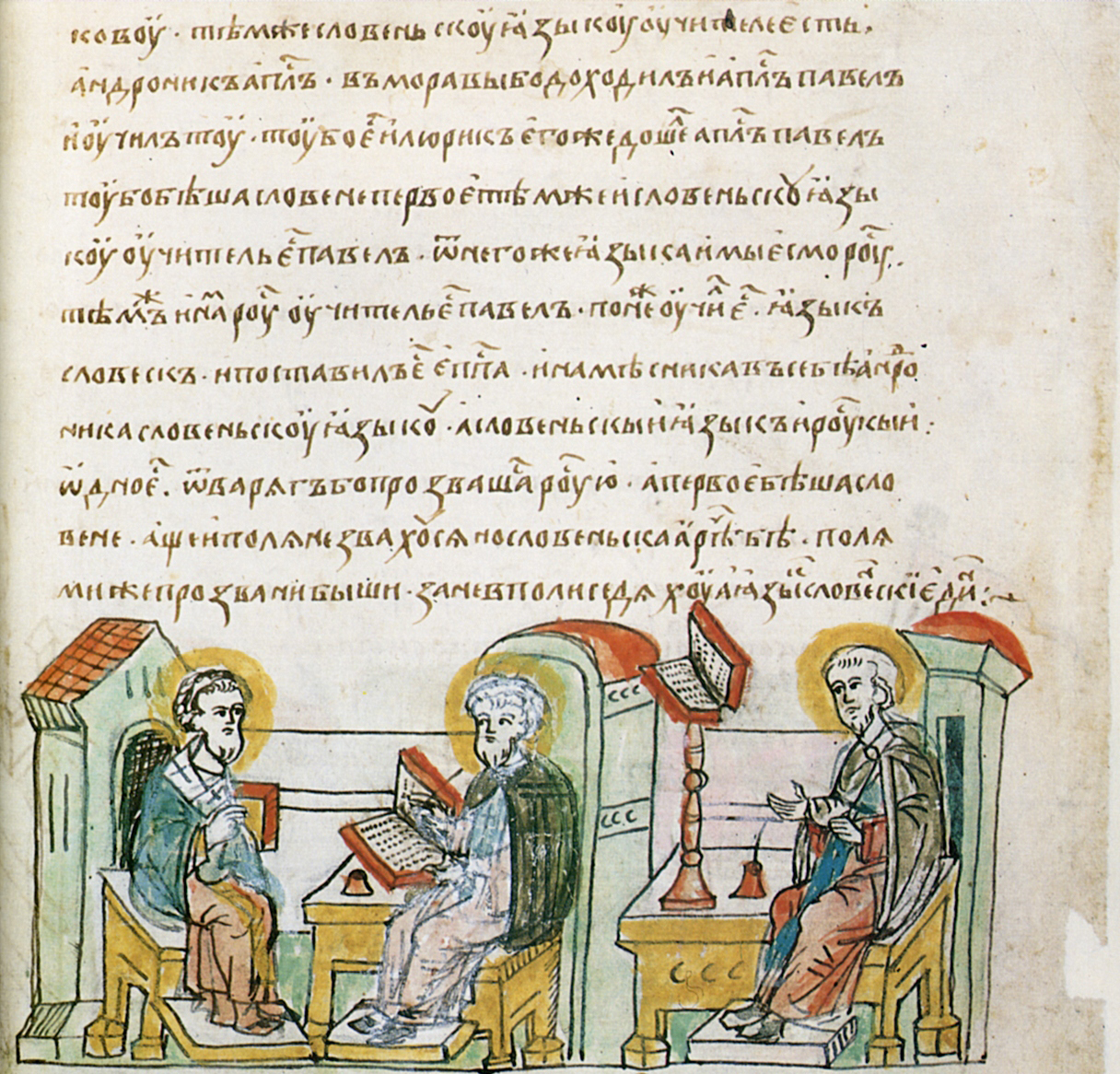 Radziwiłł-Chronik, Fol. 14r, Detail: Übersetzungs- und Schreibarbeiten unter der Leitung von Method Text aus der Radziwiłł-Chronik: "Method aber setzte 2 Priester, vortreffliche Schnellschreiber, hin und übersetzte die Heilige Schrift vollständig aus der griechischen Sprache in die slawische in sechs Monaten, angefangen von Monat März bis zum 12. Oktober."(Graßhoff, Freydank, Sturm: Rauchspur der Tauben. Radziwiłł-Chronik, S. 38)